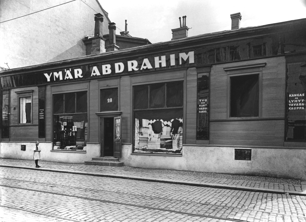 Ymär Abdrahimin kangas- ja lyhyttavarakauppa, Iso Roobertinkatu 28, Helsinki. Kuva noin vuodelta 1920.